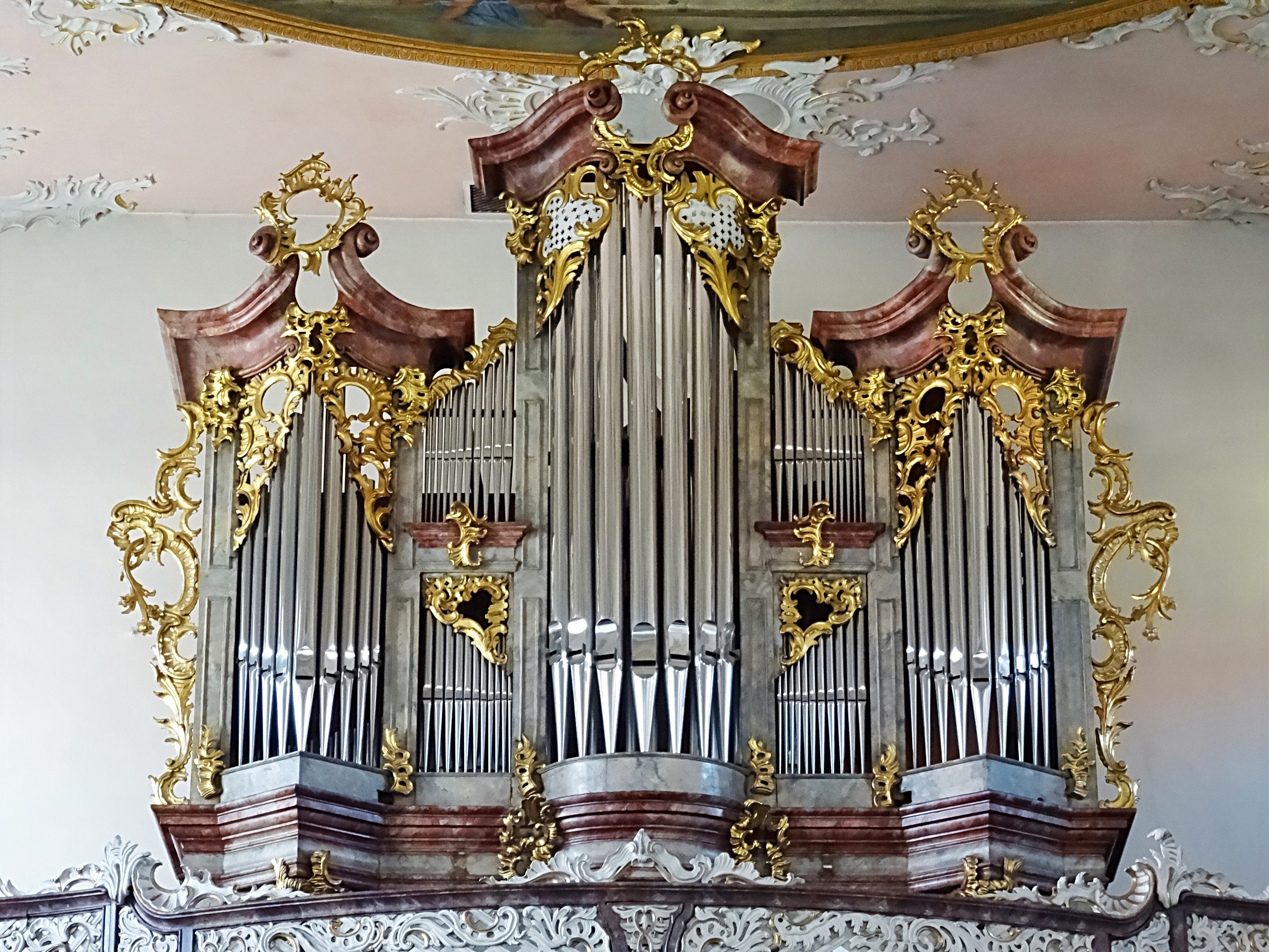 Orgel von Michael Weise (Plattling, 1935 II/P 26) im historischen Prospekt von Seuffert (1756) in der Augustinerklosterkirche St. Michael (Münnerstadt)